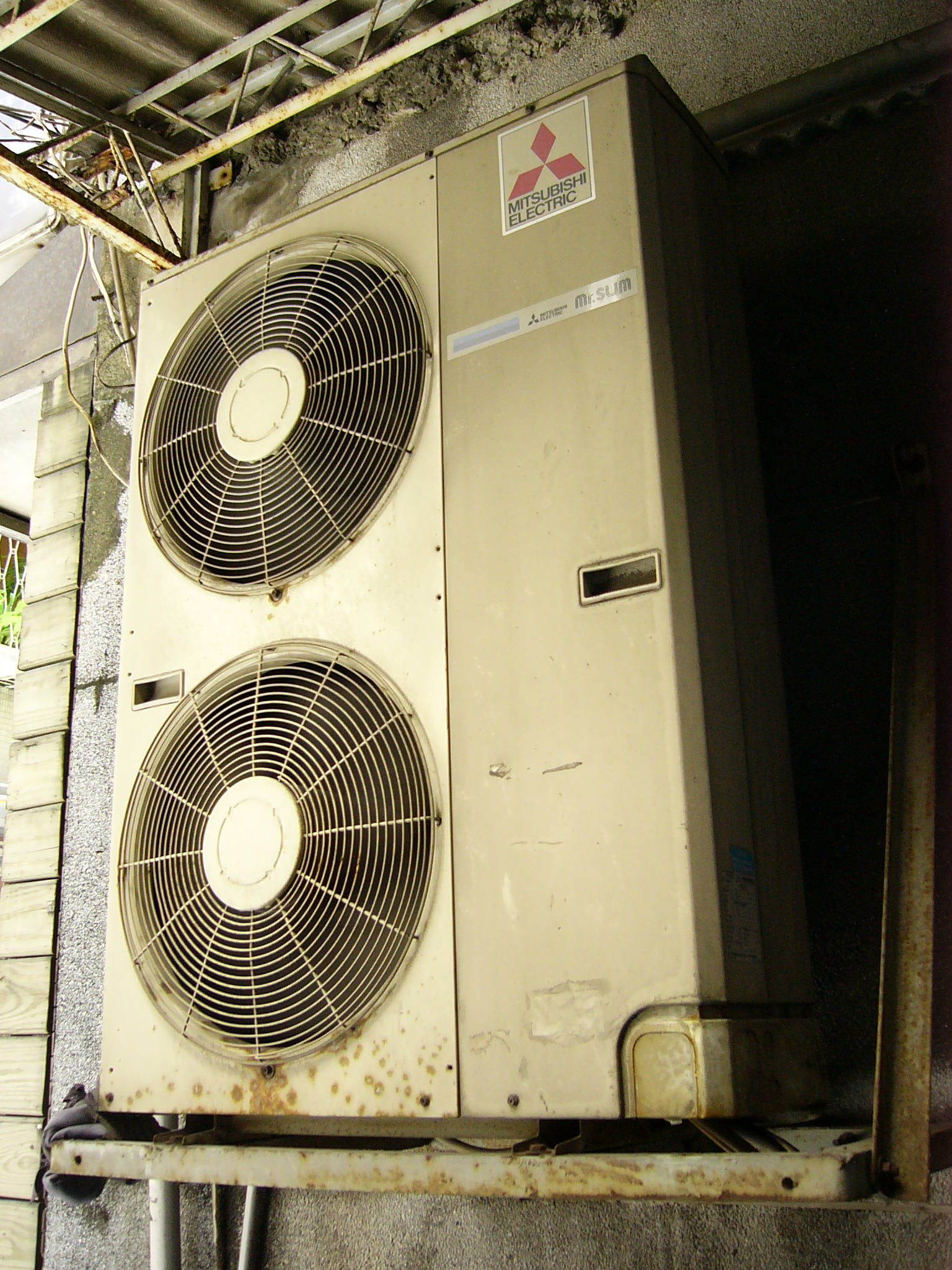 三菱電機的空調室外機PU24NEK